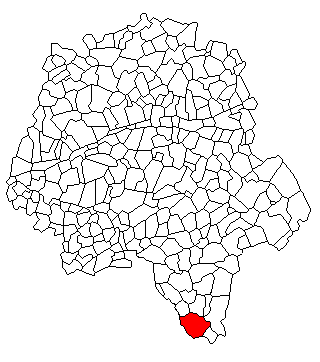 Carte Yzeures